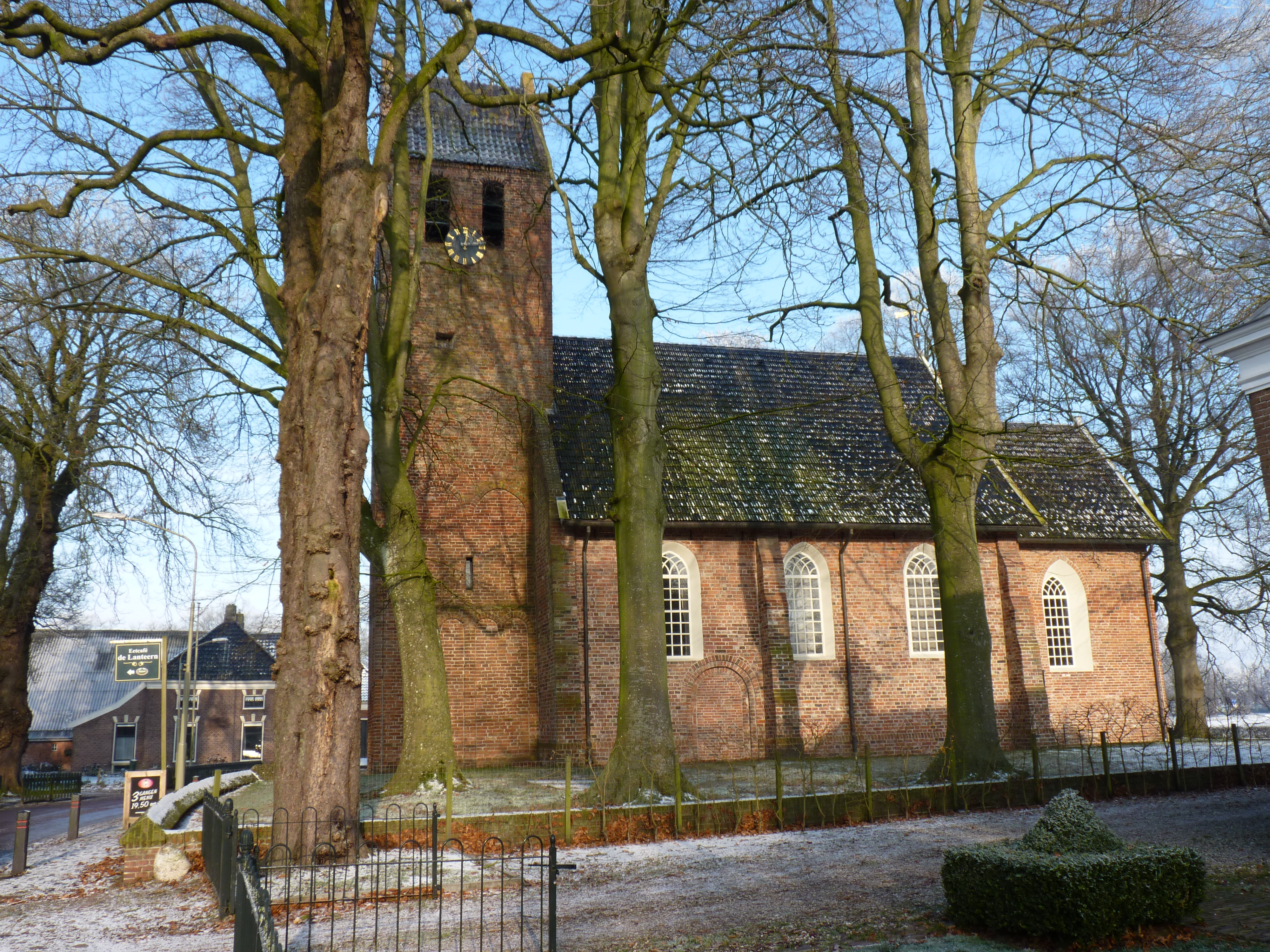 Noordlaren Kerk